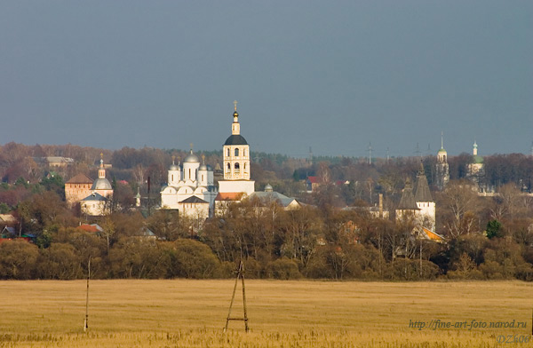 Ансамбль Пафнутьев-Боровского монастыря (Калужская область, Боровск, село Роща, Дмитрова улица (город Боровск))